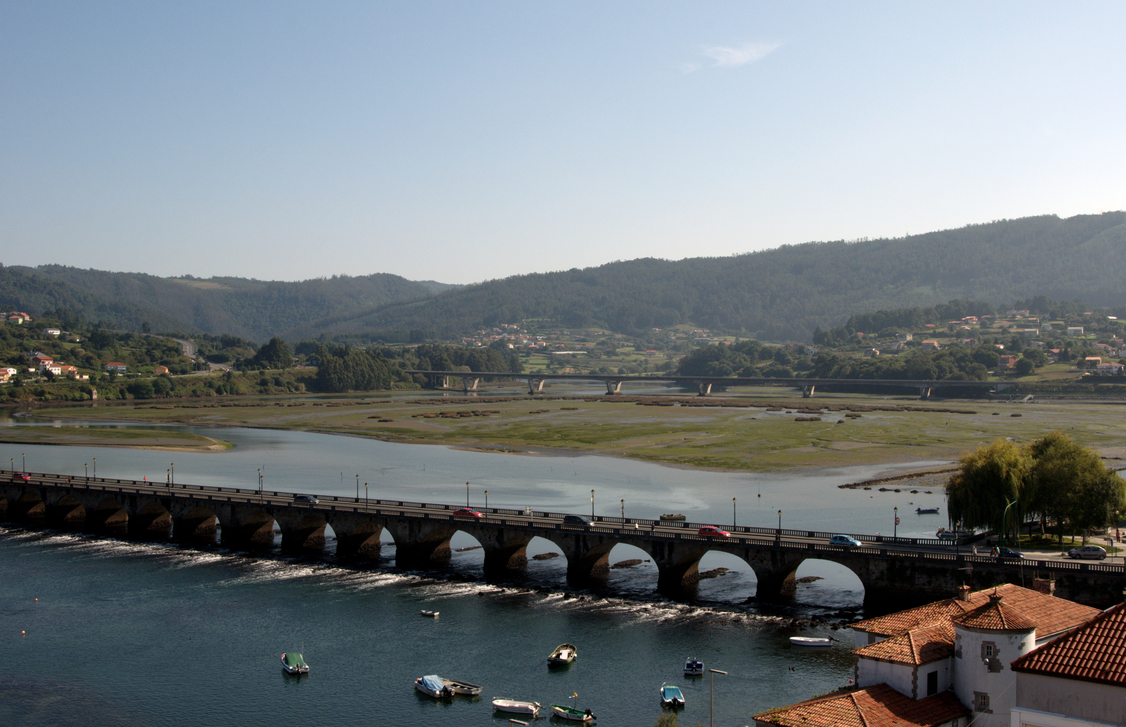 Estuario del Río Eume